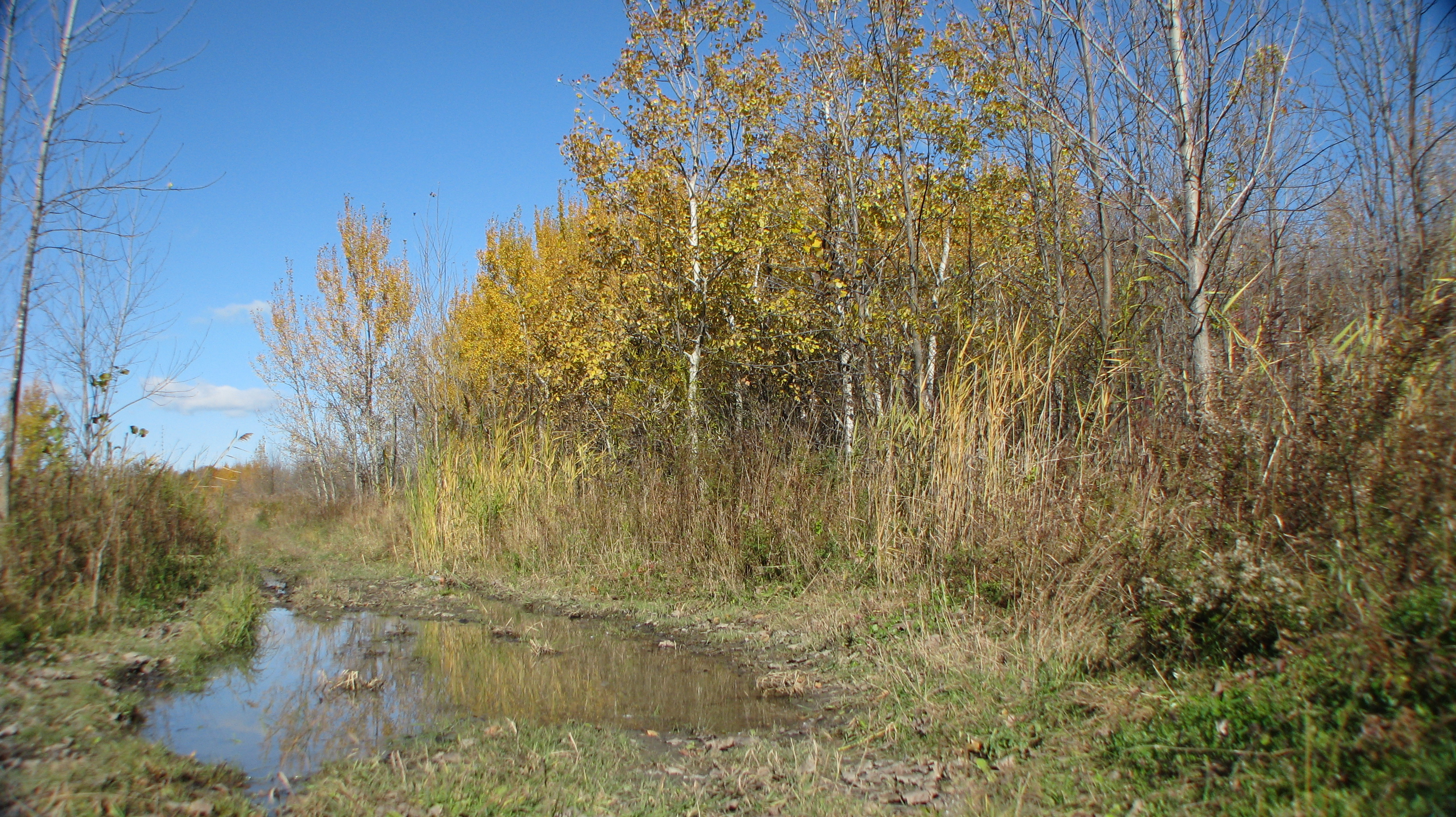 Boisé du Tremblay, à Longueuil - un terrain humide qui a du potentiel... malheureusement menacé.